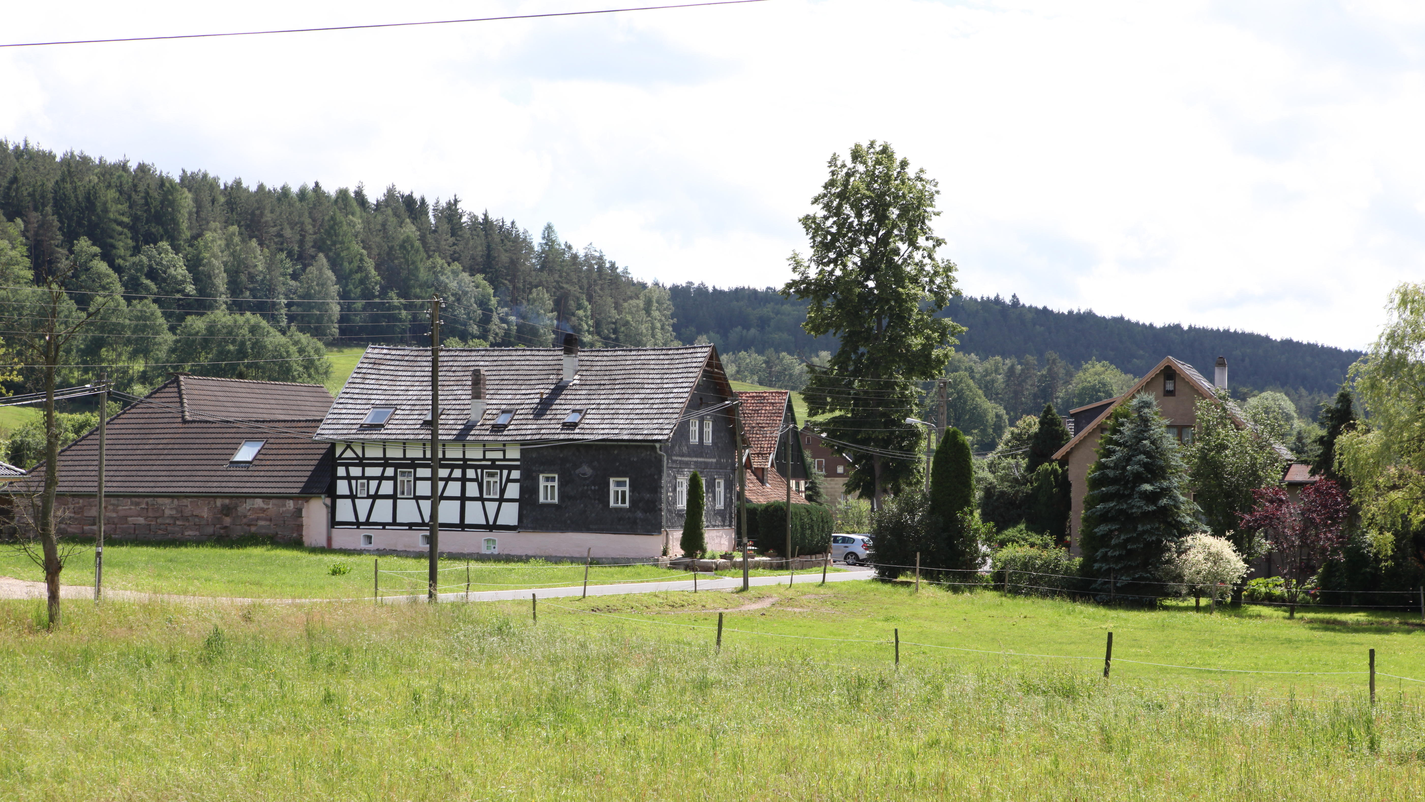 Döhlau, OT von Frankenblick, Thüringen